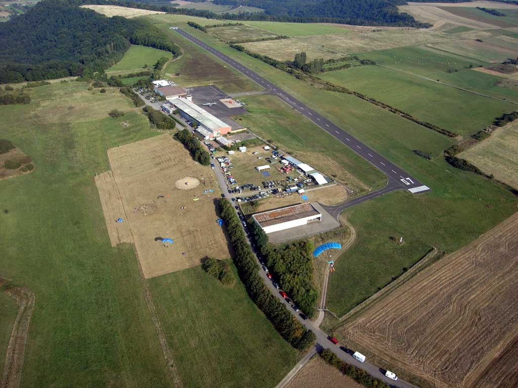 Flugplatz Saarlouis-Düren bei Wallerfangen-Düren (Saarland) und Sprungplatz vom FSV Saar e.V.